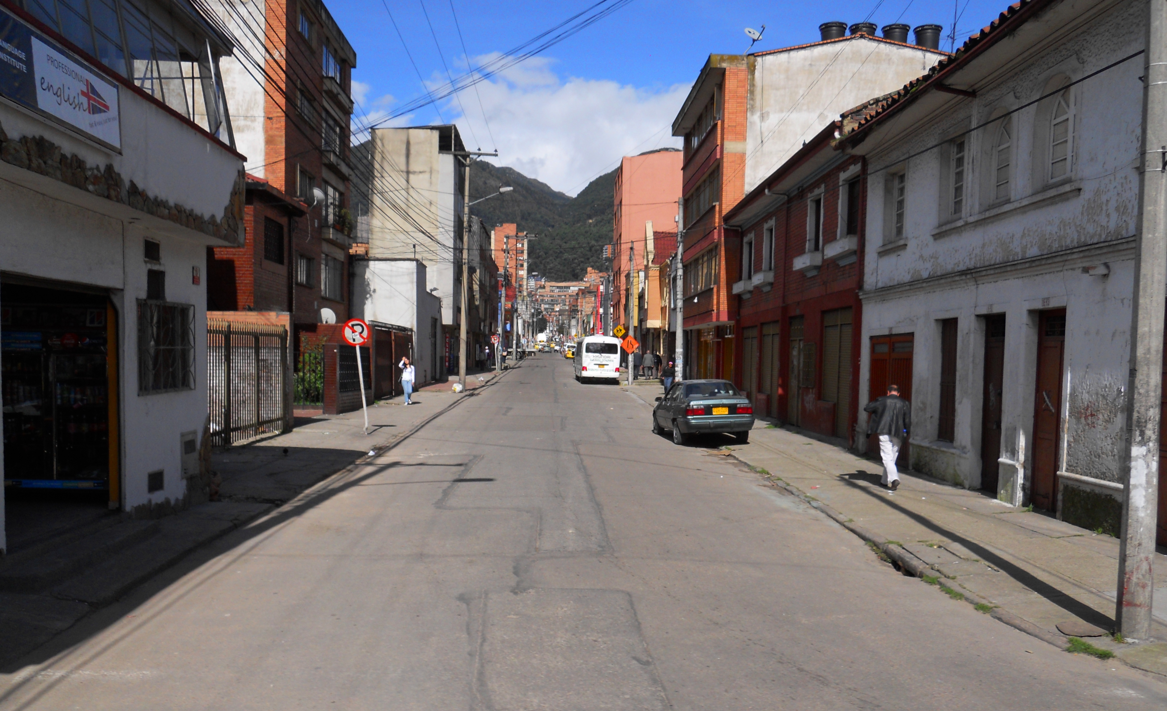 Calle 52 Cincuenta y dos con carrera 17 Diecisiete Bogotá, barrio Quesada. Localidad de Teusaquillo.